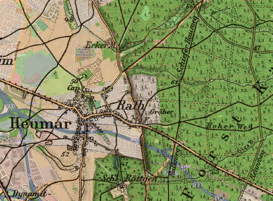 Karte von 1893, überlagert mit OSM-Karte von 2012 Gegend um Heumar in Köln